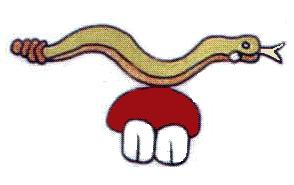 Escudo del municipio de Coatlán del Río, Morelos.